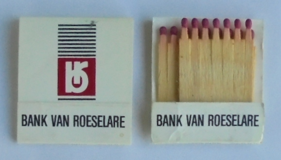 Relatiegeschenk van de Bank van Roeselare: lucifers